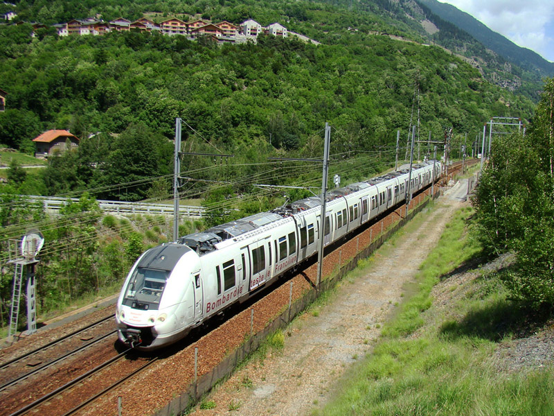 Z 50001/2 en essai en redescendant de Modane vers Saint-Jean-de-Maurienne.